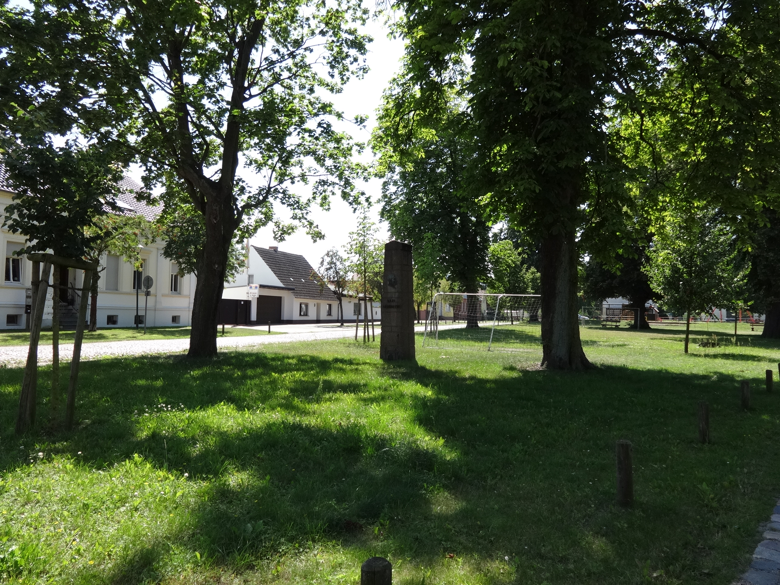 Denkmalgeschützte Karl-Liebknecht-Gedenkstätte im Dorfanger von Tietzow, ein Ortsteil der Stadt Nauen im Landkreis Havelland in Brandenburg